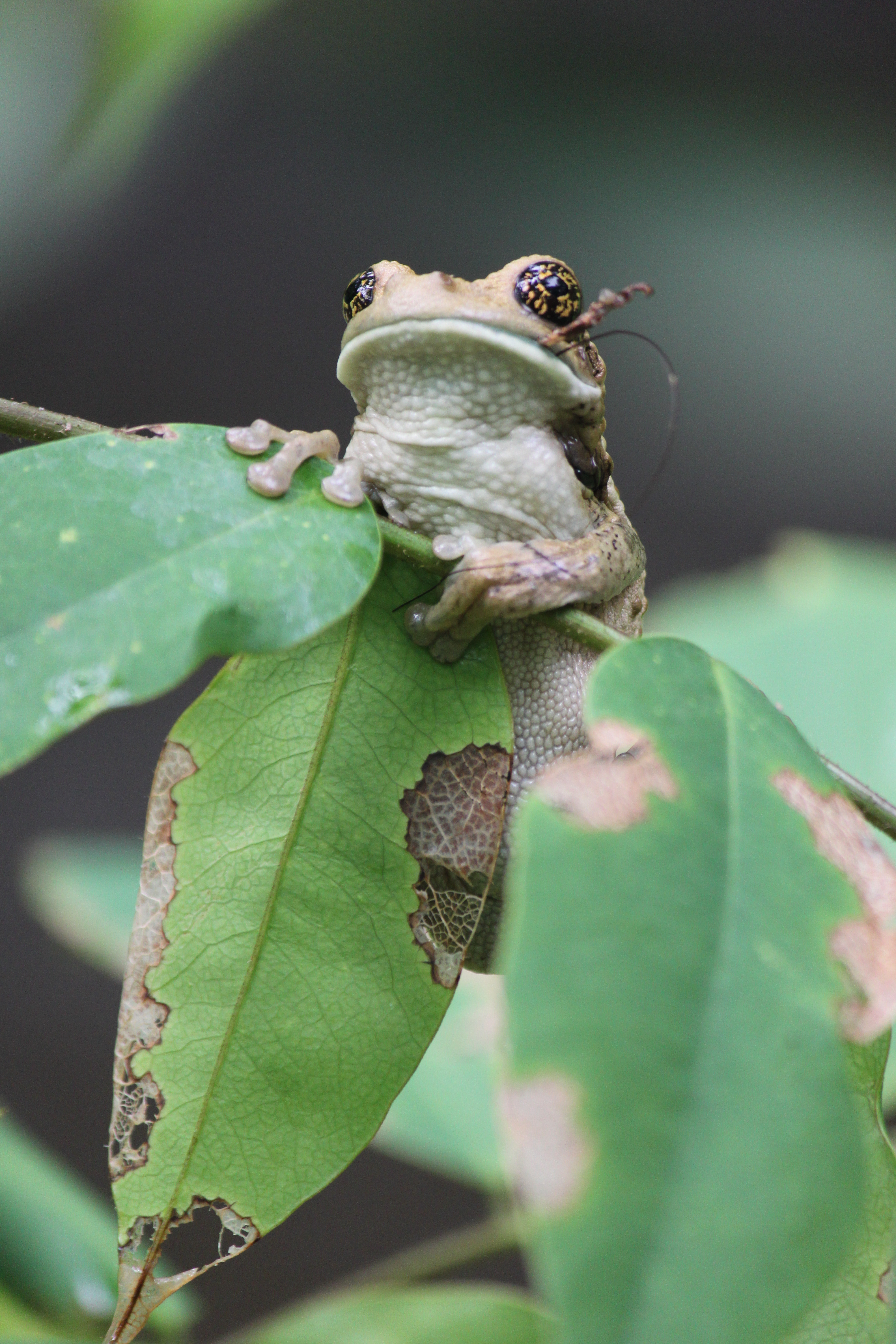 ejemplar de la especie Trachycephalus typhonius(rana lechosa) fotografiado en la comunidad indigena Miskita de Wampusirpi, departamento de Gracias a Dios, concejo territorial de BAKINASTA, zona cultural de la RHBRP. This is an image of the Biosphere Reserve or a Geopark: Río Plátano Biosphere Reserve